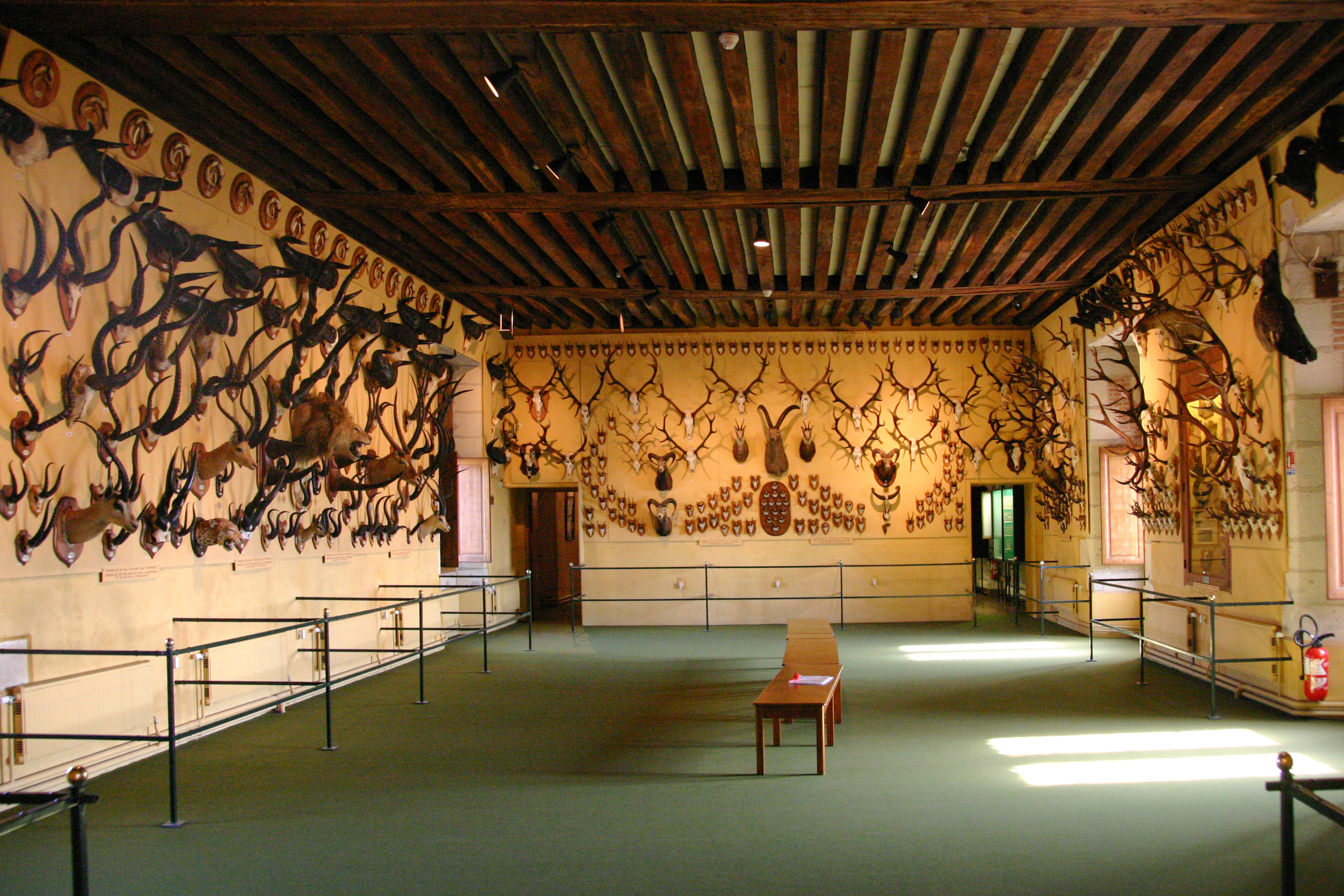 Jagdmuseum im Schloss Gien